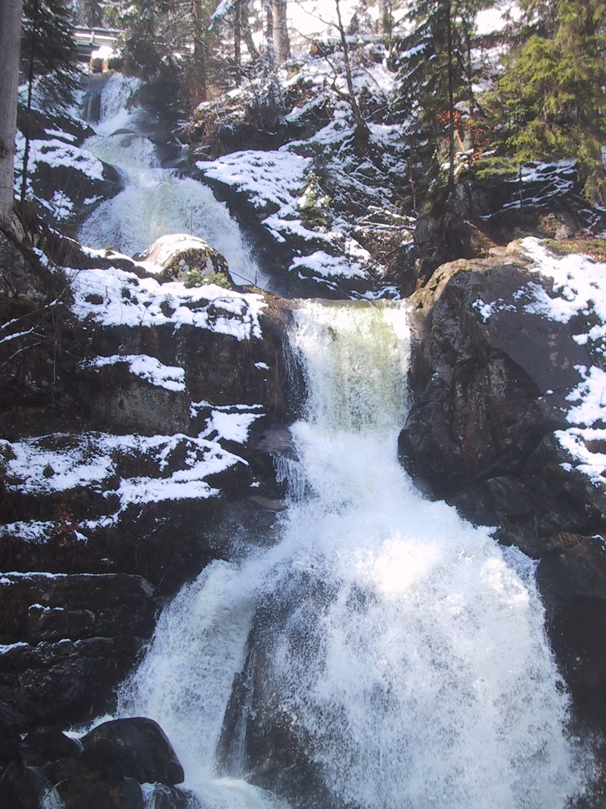 Wasserfall in Triberg im Schwarzwald Description: Waterfall in Triberg, Black Forest, Germany Source: self taken picture Fotograf/Photo by: Siegfried Wessler Datum/Date: 11. April 2006